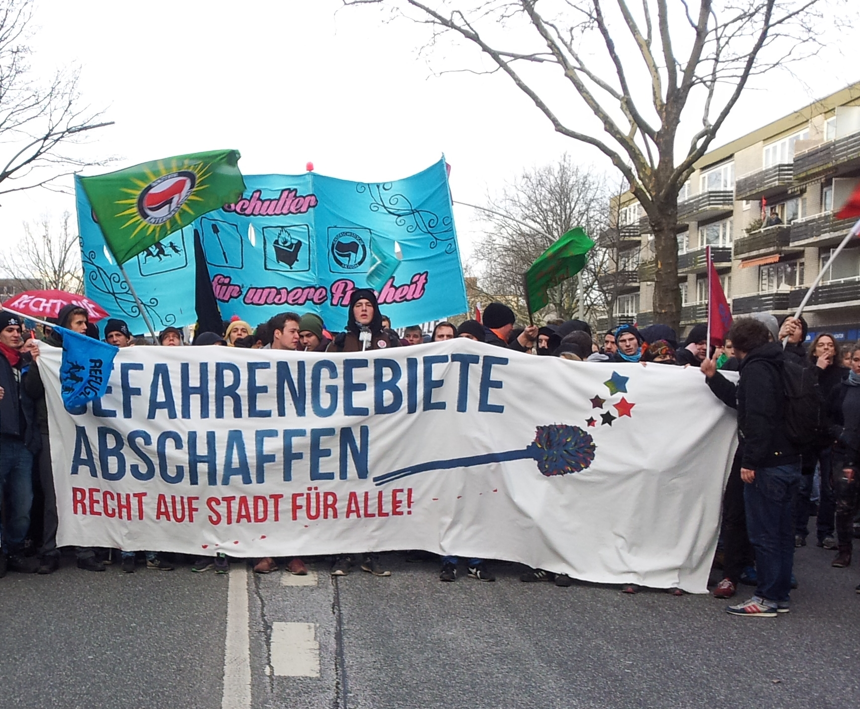 Demonstration in Hamburg am 18. Januar 2014 gegen das polizeiliche Gefahrengebiet